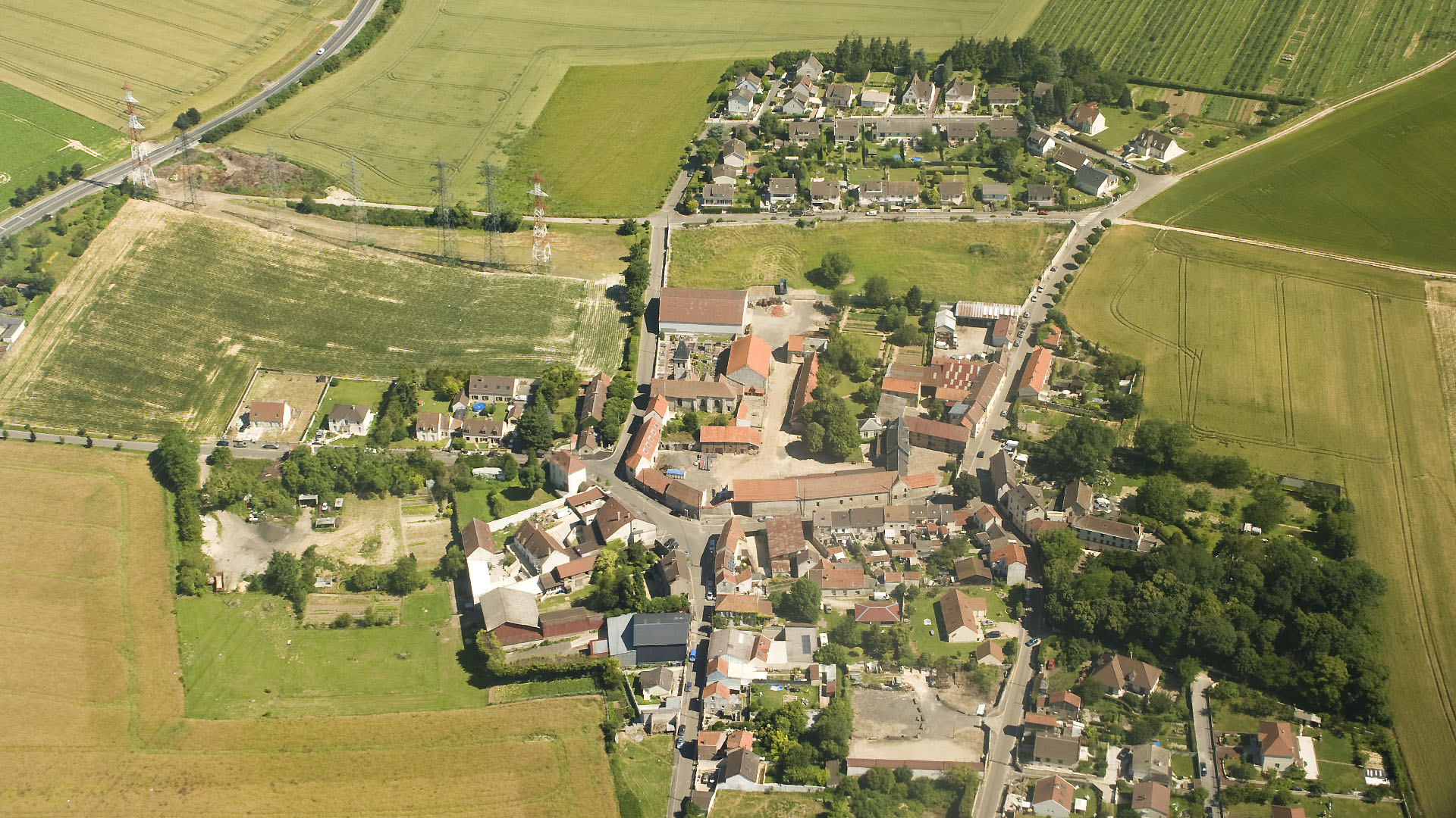 Vue aérienne du village de Bouqueval